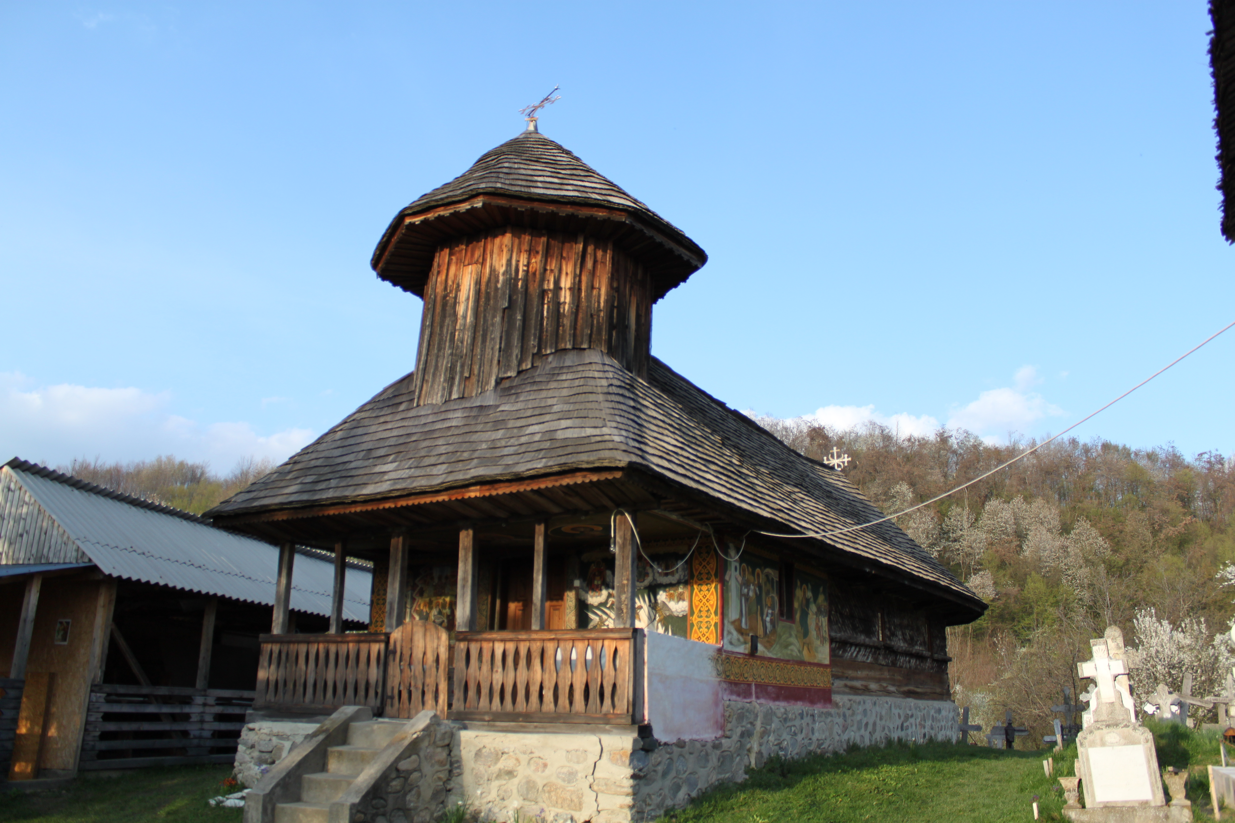 Biserica de lemn din Bărbălăteşti, judeţul Argeş.